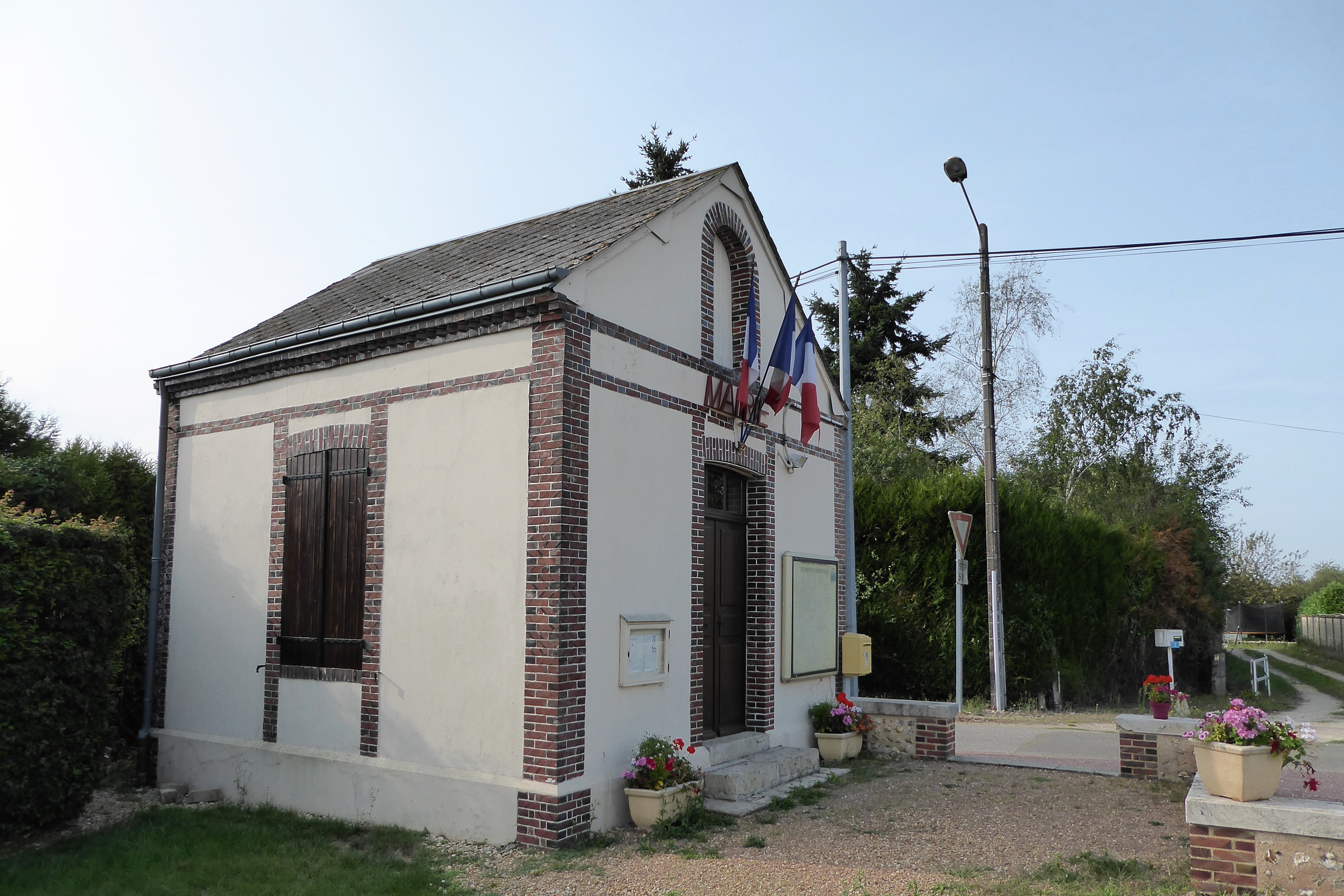 mairie de Cernay, Eure-et-Loir, France.